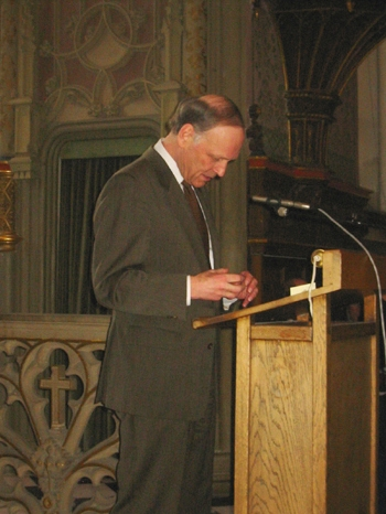 Peter Graf Kielmansegg (german politologist)